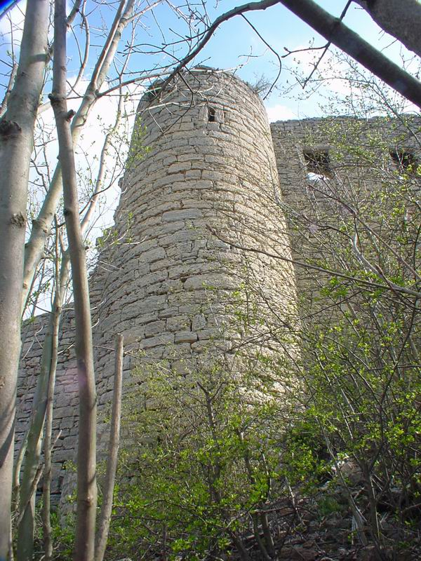 Gleißburg, public domain, eigenes Foto Mewes 08:00, 13. Feb 2005 (CET)